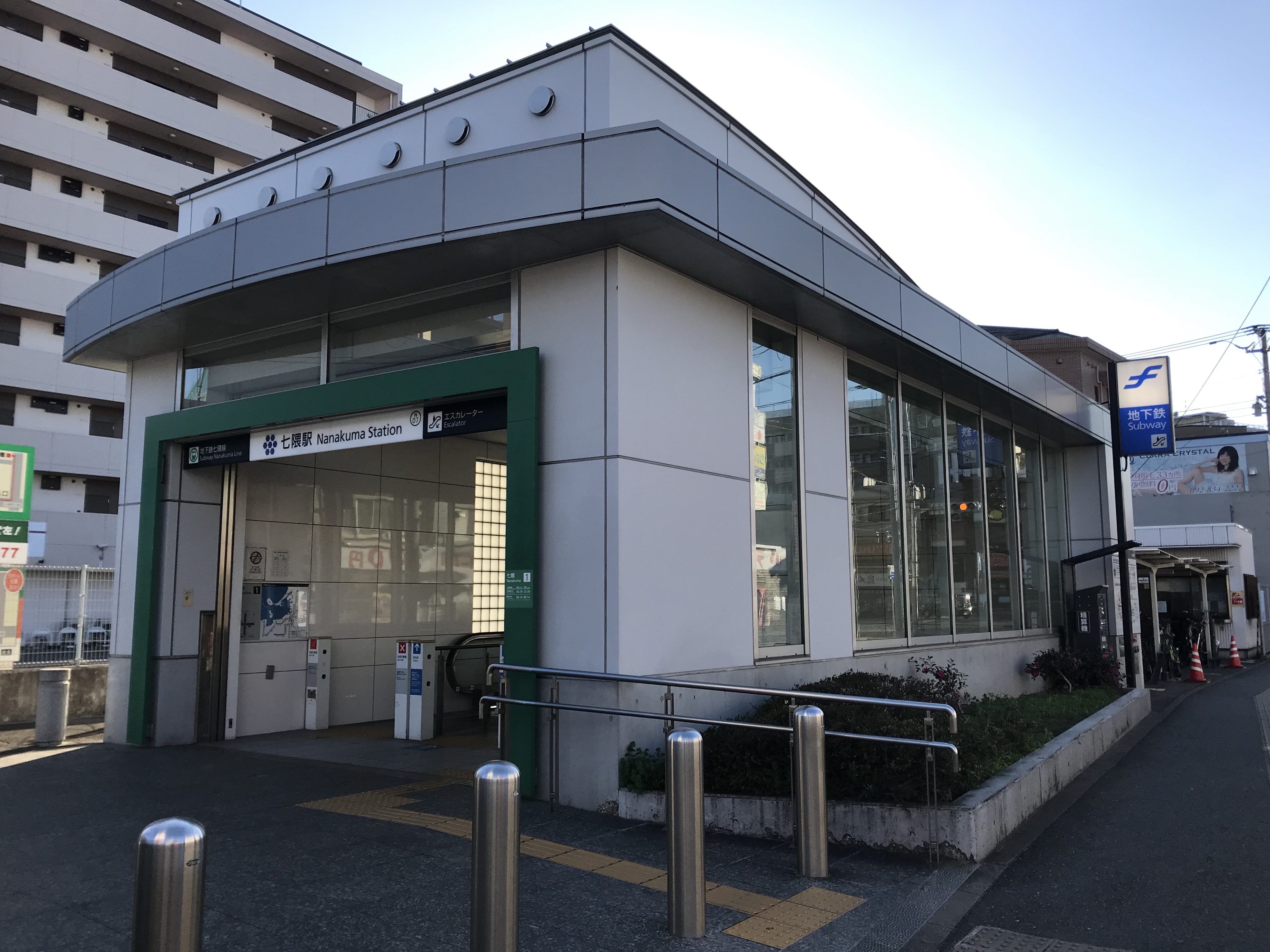 七隈駅の1番出入り口